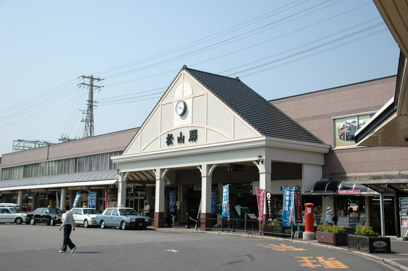 JR-Shikoku(JAPAN) Yosan-Line, Matsuyama Sta. photo by (2005.9.17)